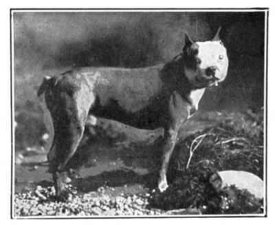 Boston Terrier "Barnard's Tom" (1877).